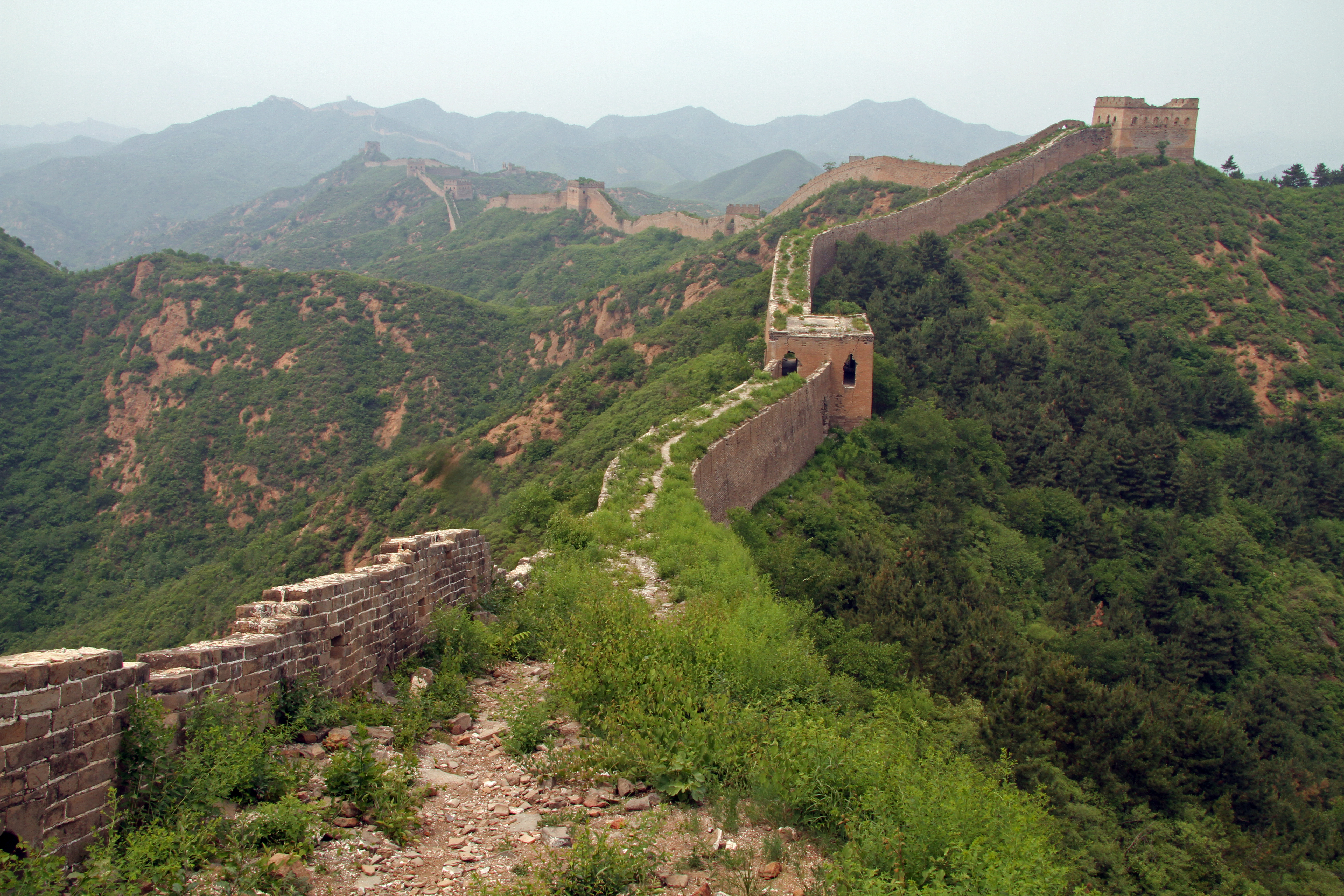 Gubeikou to Jingshanling 50